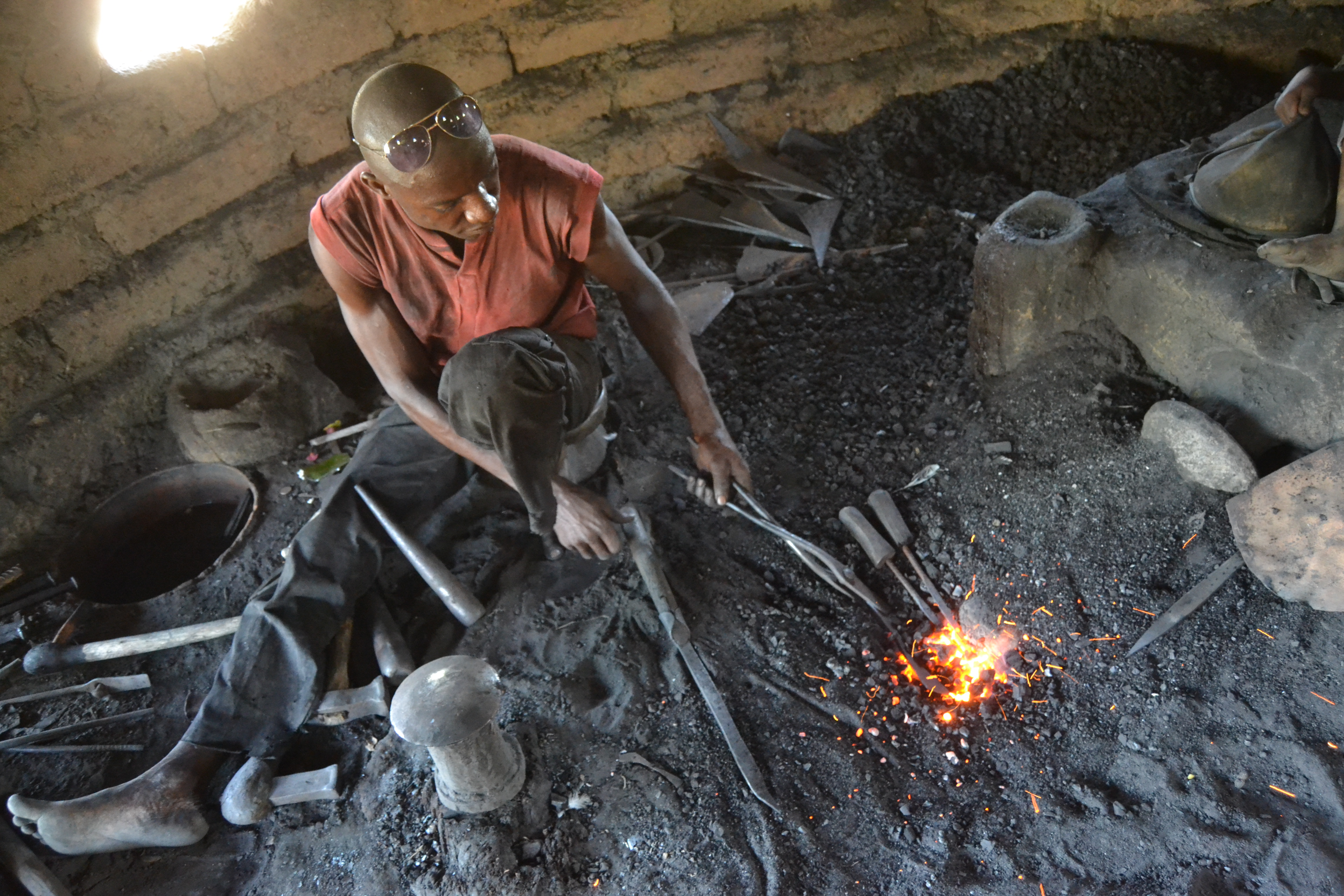 Un forgeron en activité, dans son atelier, à Ferké, une ville située au nord de la Côte d'Ivoire, à environ 600 km d'Abidjan, la capitale économique ivoirienne. This is an image of "African people at work" from Ivory Coast